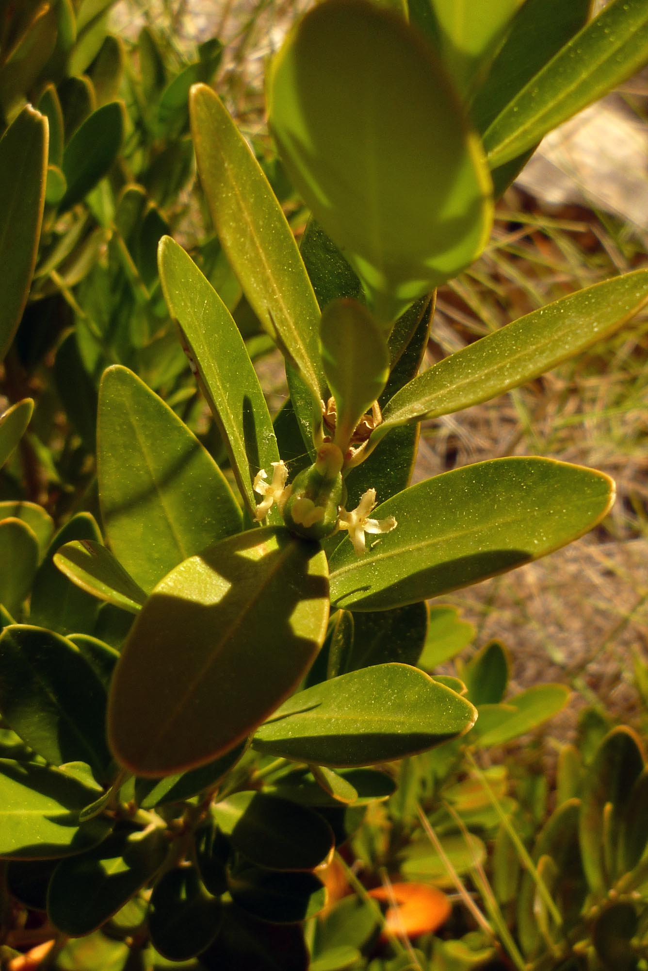 Buxus balearica